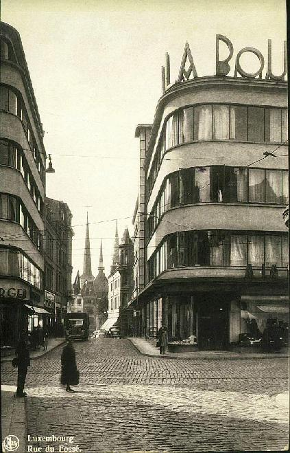 Magasin "À la Bourse", Luxembourg rue du Fossé, coin Grand-Rue (place du Puits-Rouge), vers 1950